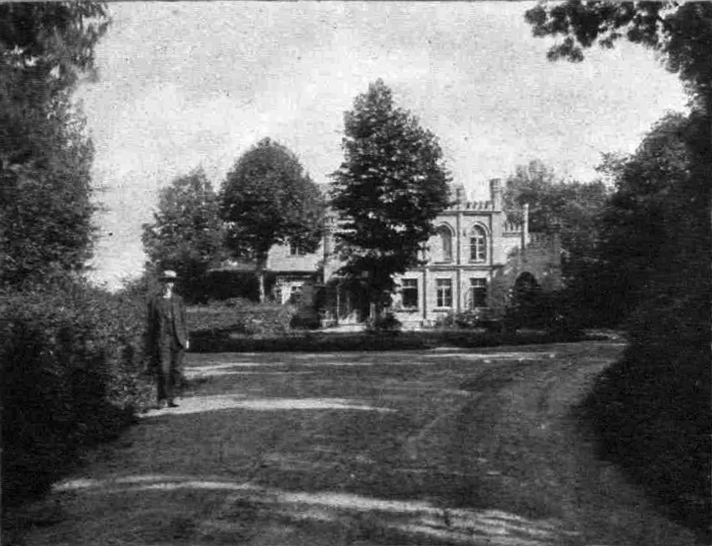 Беларуская (тарашкевіца): Флер’янова (Flerjanova), сядзіба Бохвіцаў (Bochvic)